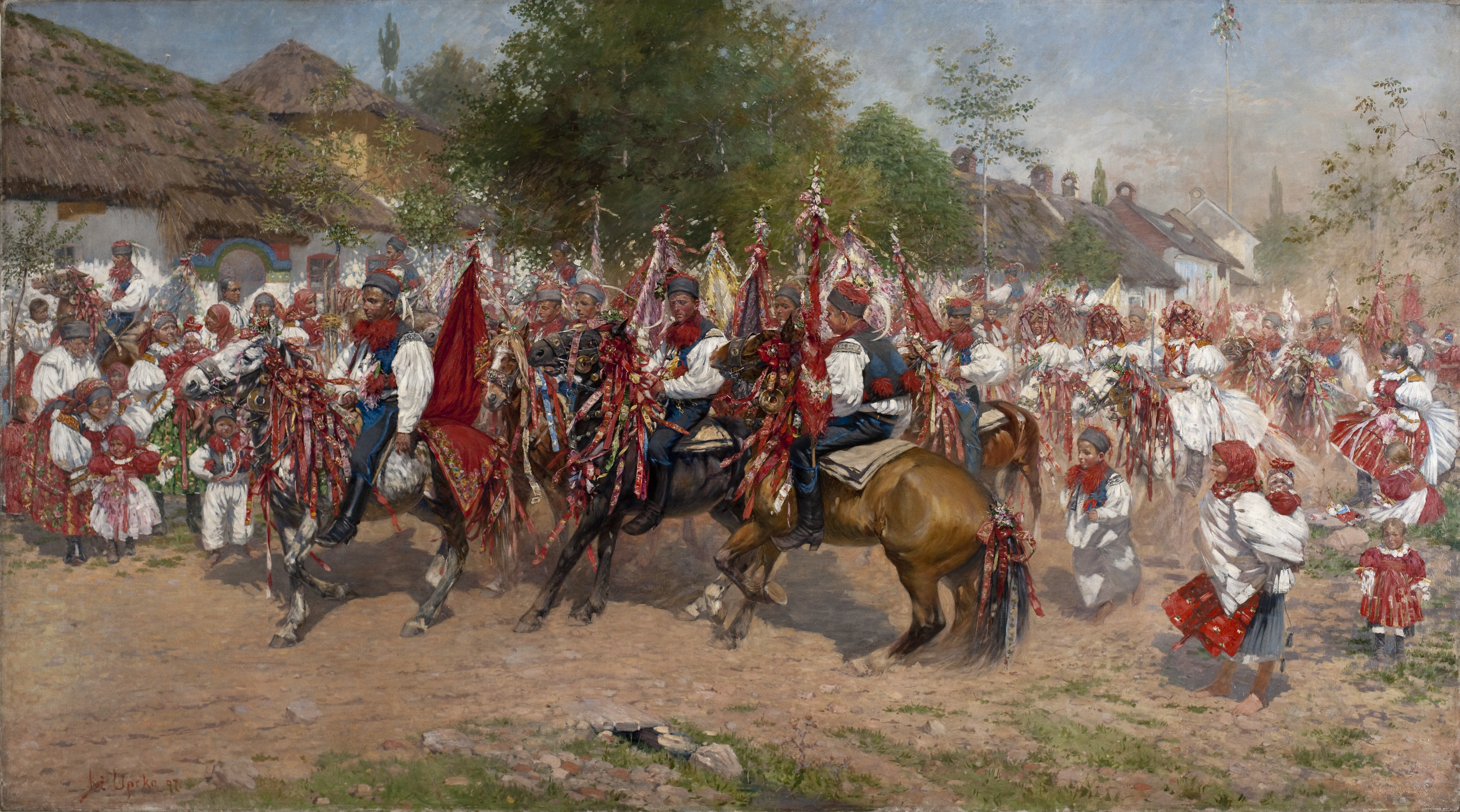 Obrázky Jožy Uprky na pohlednicích